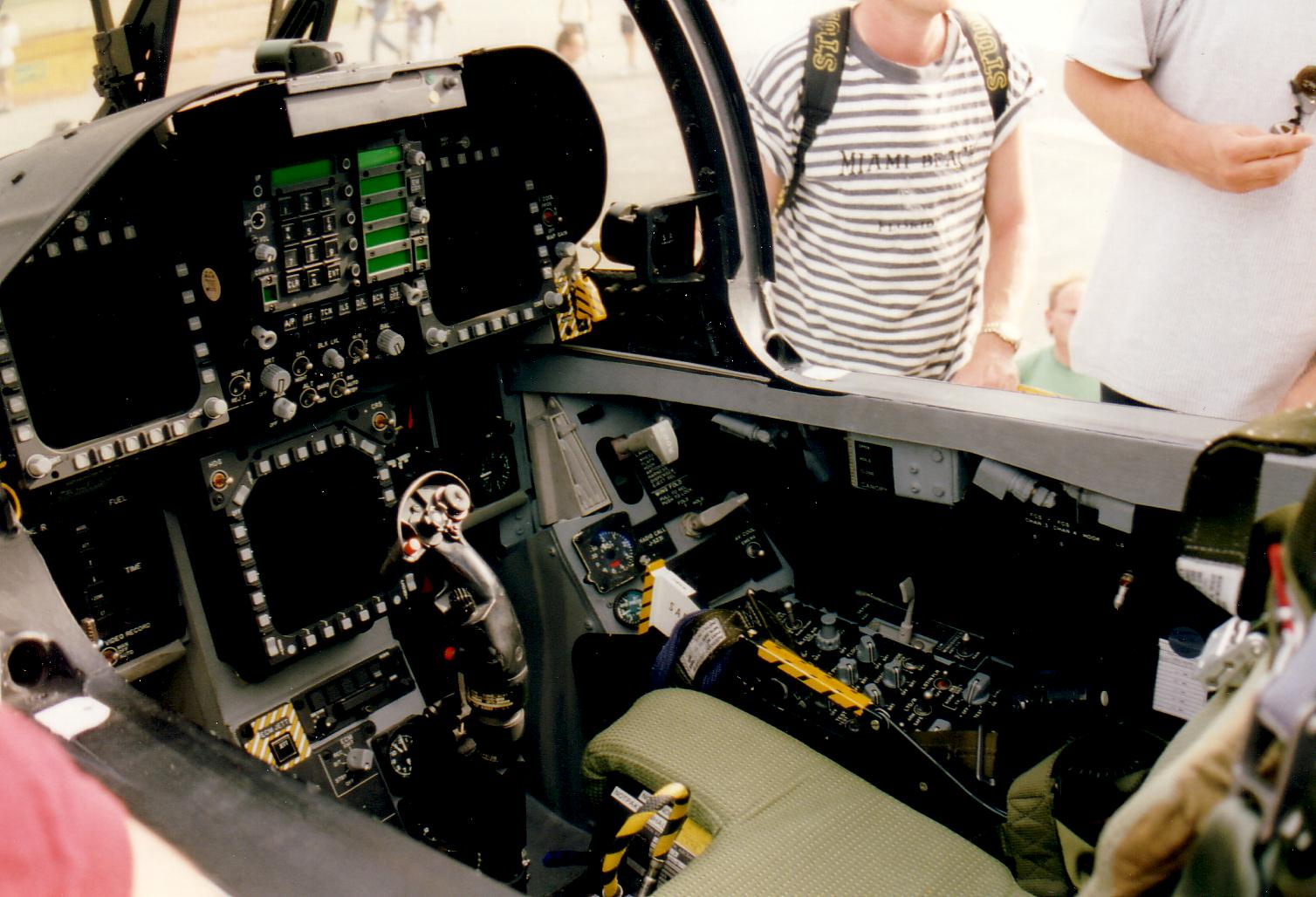 Cockpit d'un F18 au meeting de Sion en 1997.